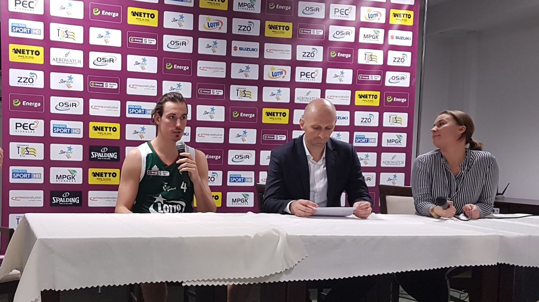 Konferencja prasowa (17.11.2018)